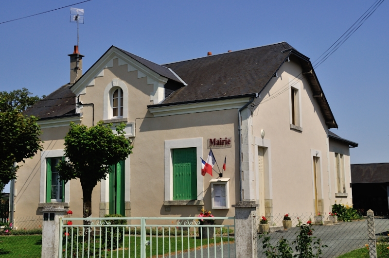 Marie de Frédille (Indre)